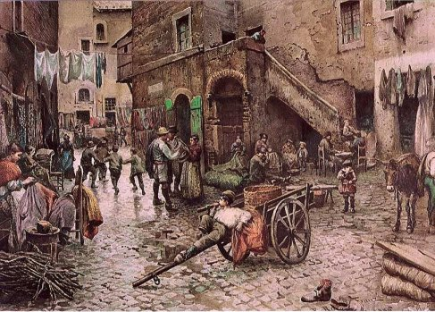 Vicolo Capocciuto in Ghetto (rione Sant'Angelo)